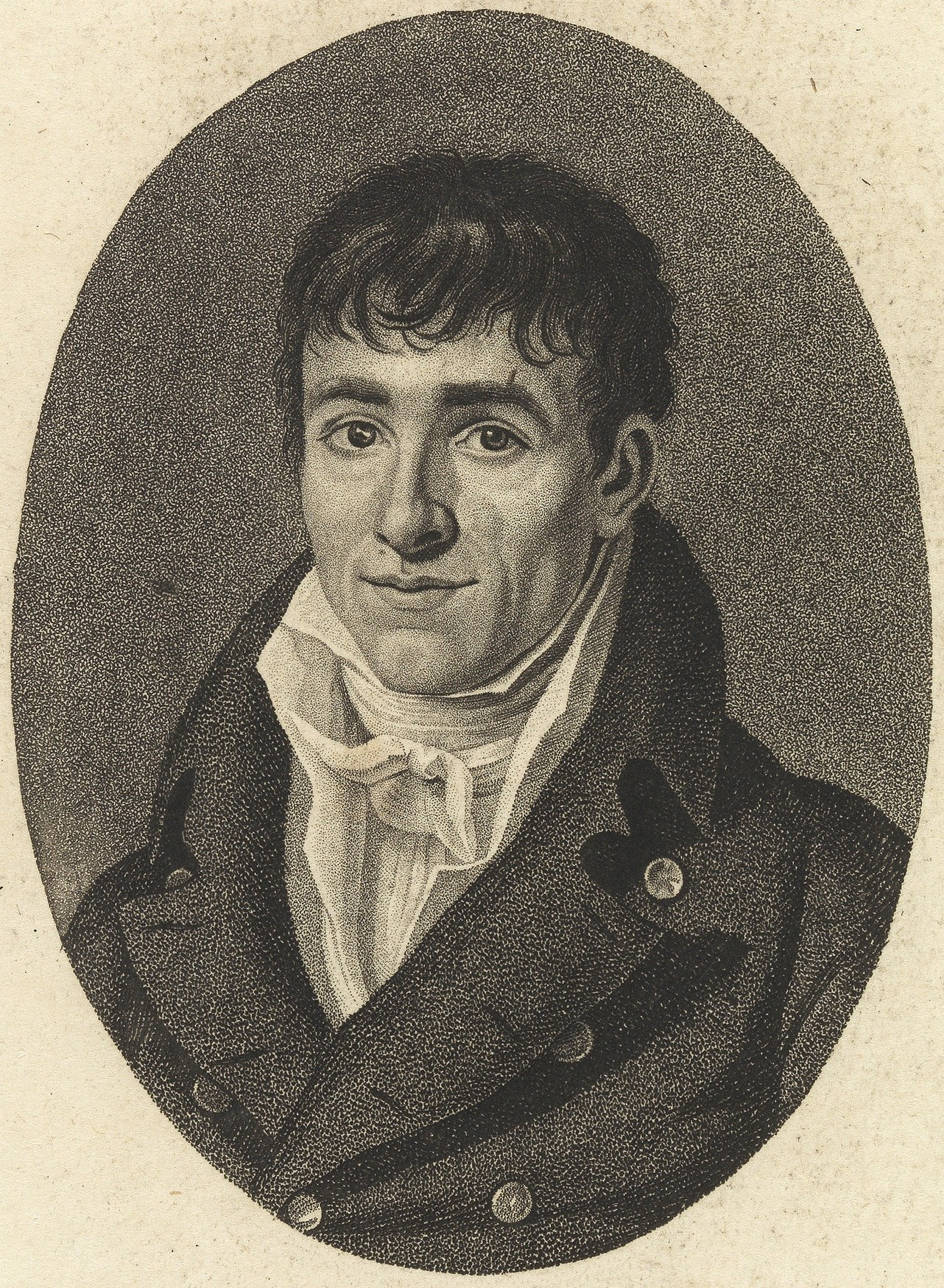 François Péron